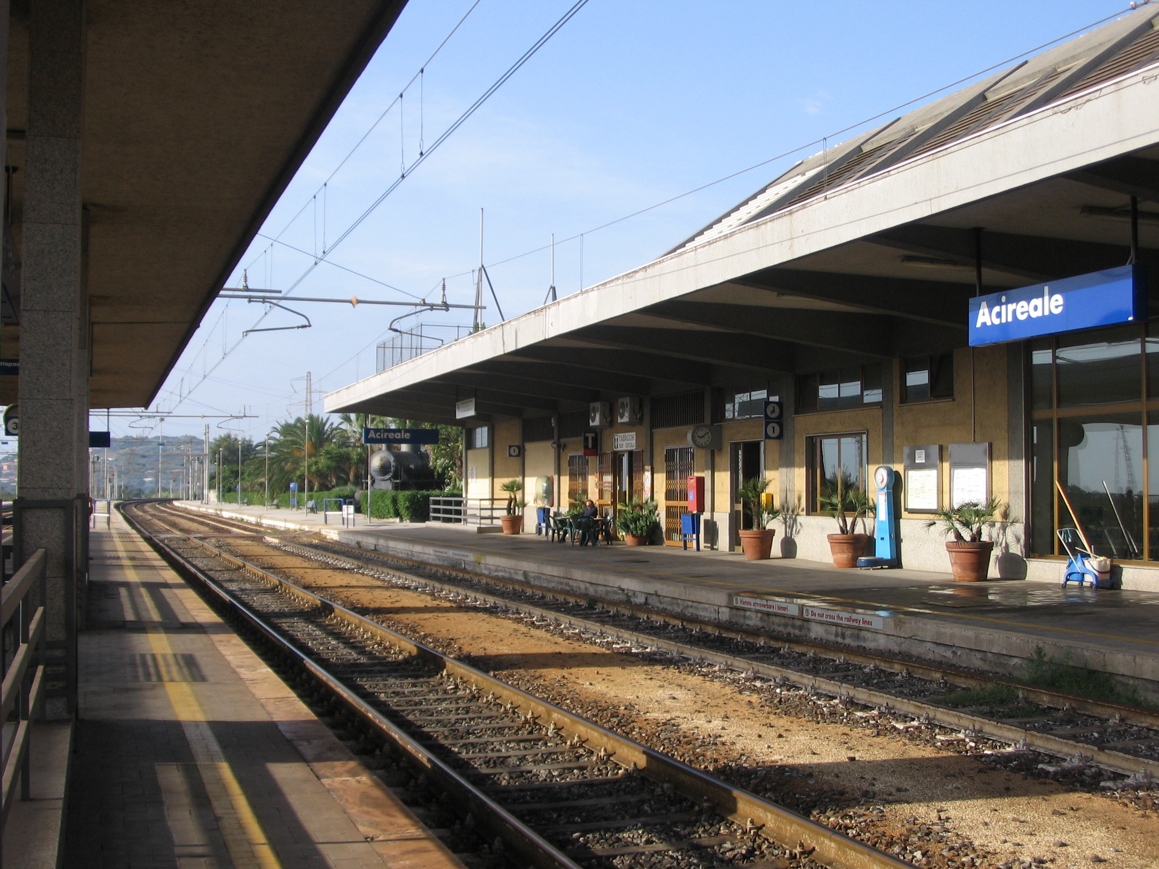 Stazione di Acireale particolare del binario 1